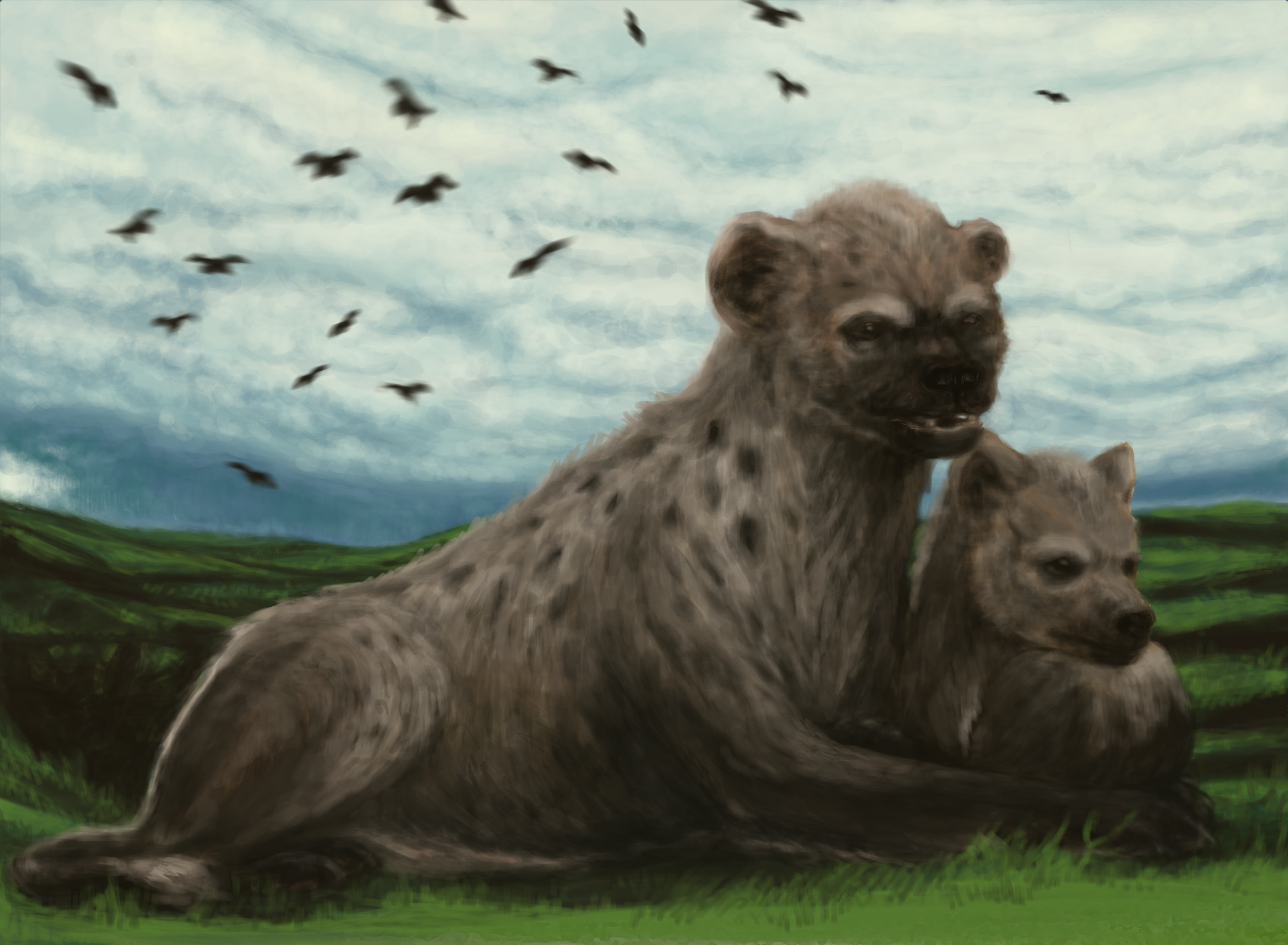 Crocuta crocuta spelaea 'Quiet before the storm' by Serena Stelitano 2017